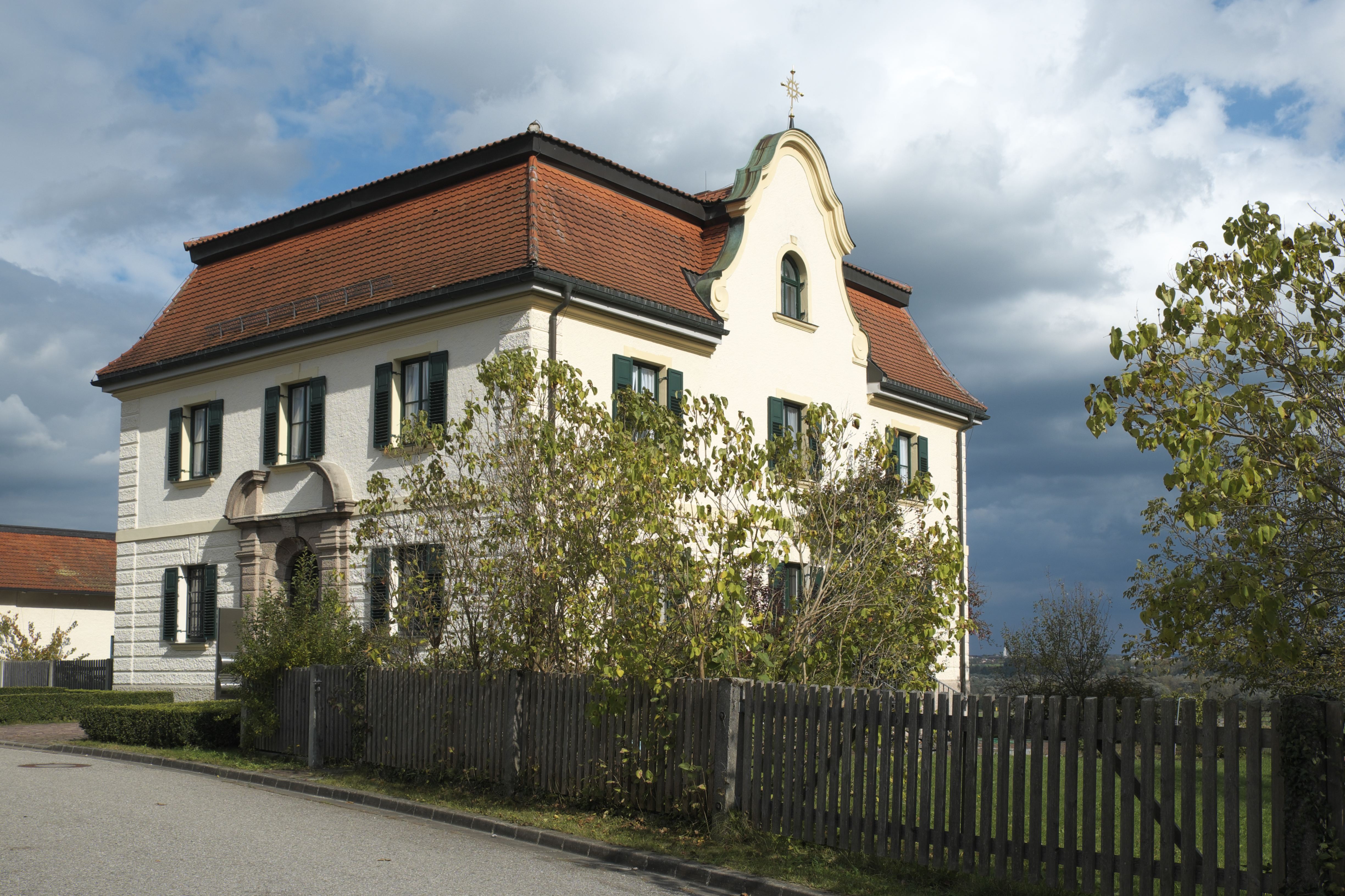 Pfarrhaus in Rott am Inn im Landkreis Rosenheim (Bayern/Deutschland)